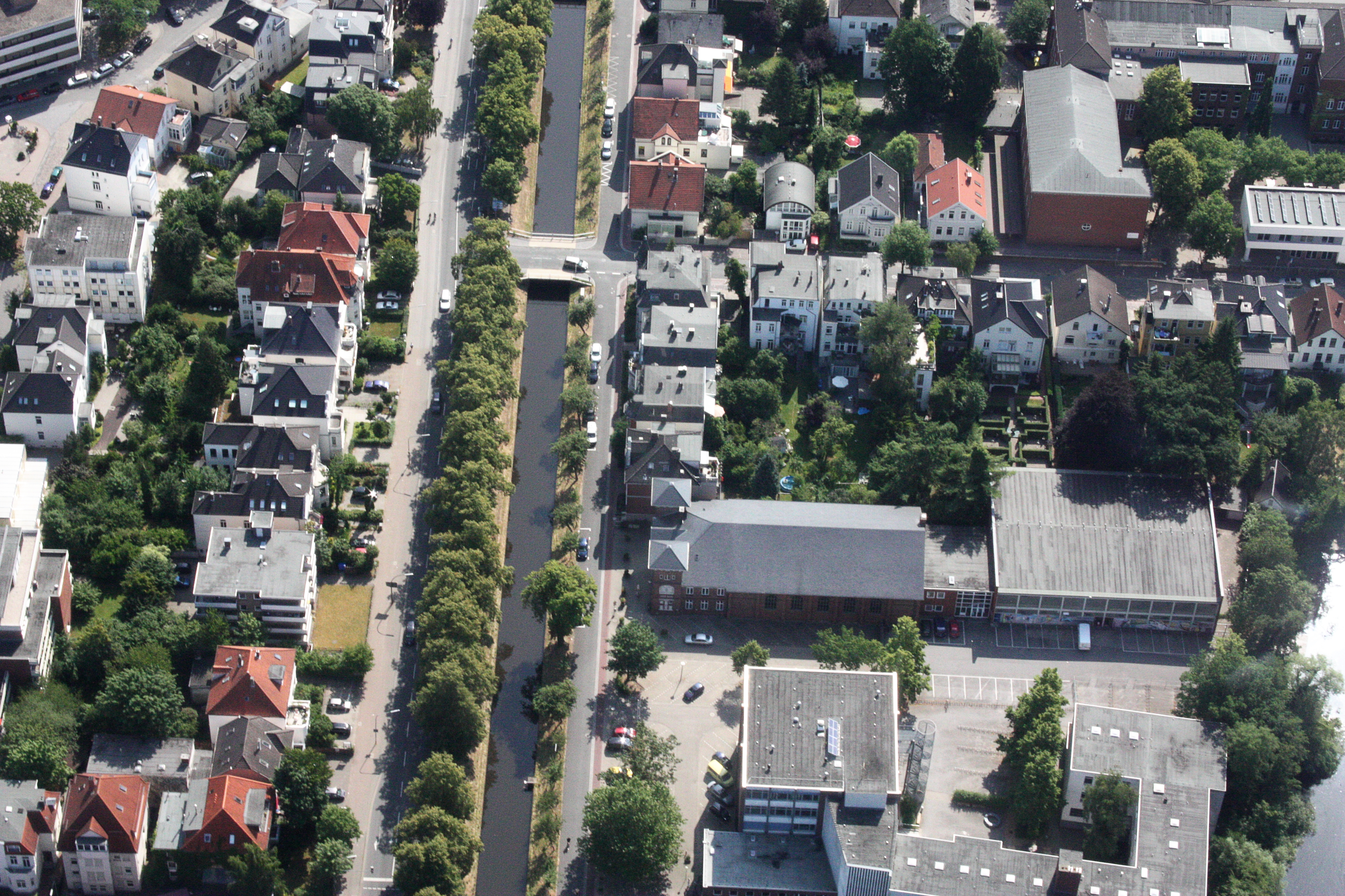 Luftaufnahmen Oldenburg (Oldenburg), mit Weiterflug nach Westen; 1500 Fuß Flughöhe; Juli 2010; Originalfoto bearbeitet: Tonwertkorrektur und Bild geschärft mit Hochpassfilter